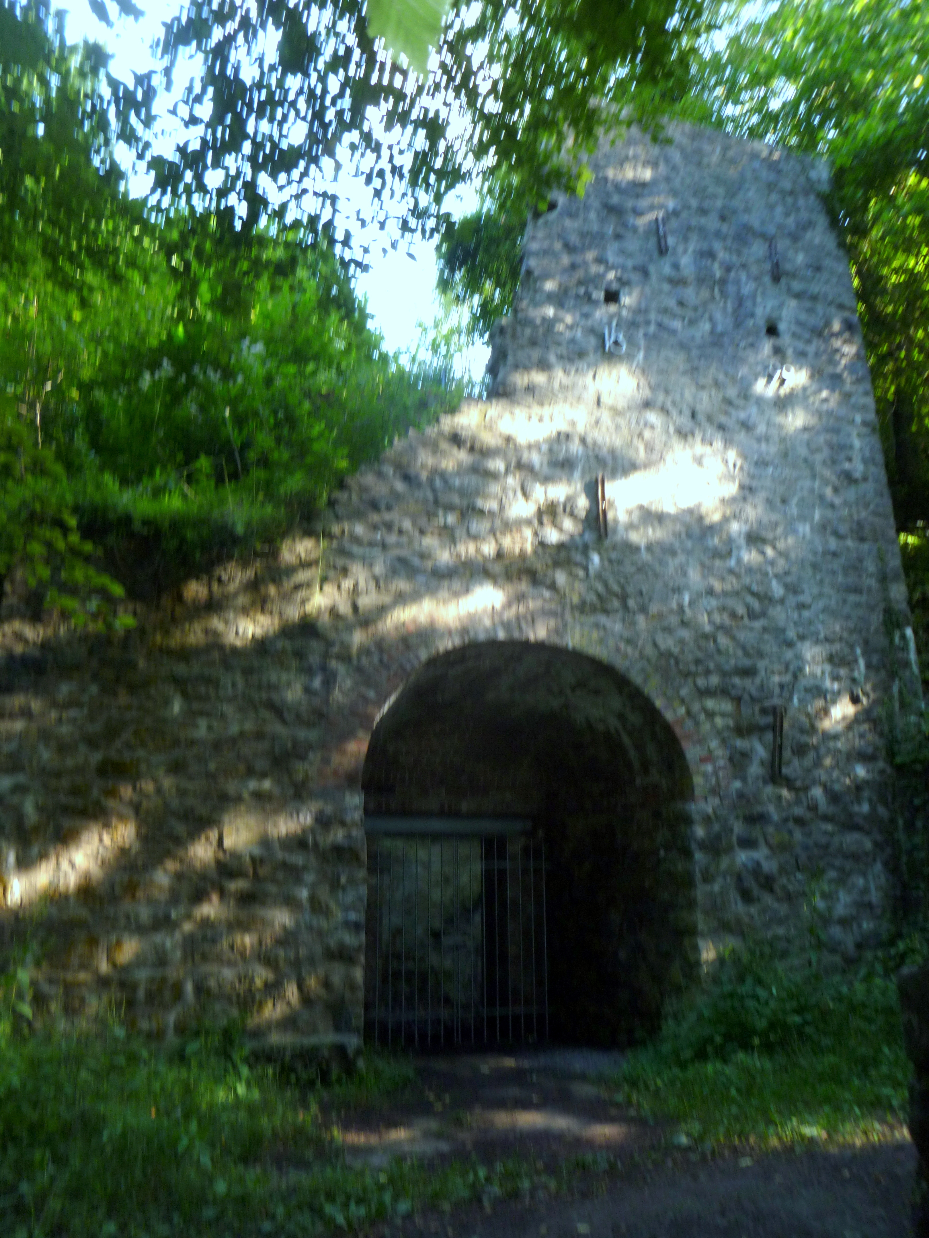 Kalkofen "In der Au" in Aachen-Hahn, am Kalkofenweg; Baujahr 1899